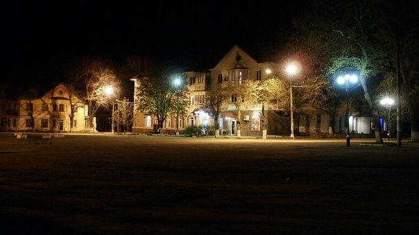 м. Покров, площа ім. Івана Сірка